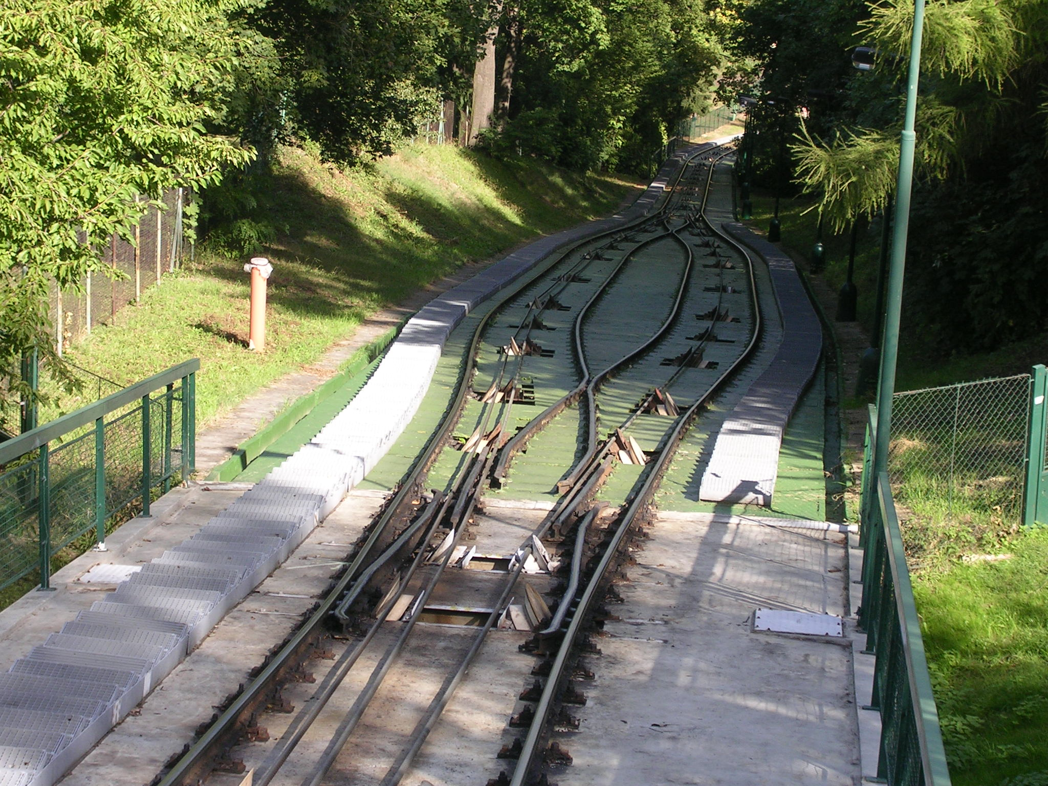 Abtova výhybka, Praha, lanová dráha na Petřín